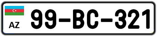 Azərbaycan Respublikası avtomobil dövlət qeydiyyat nişanı